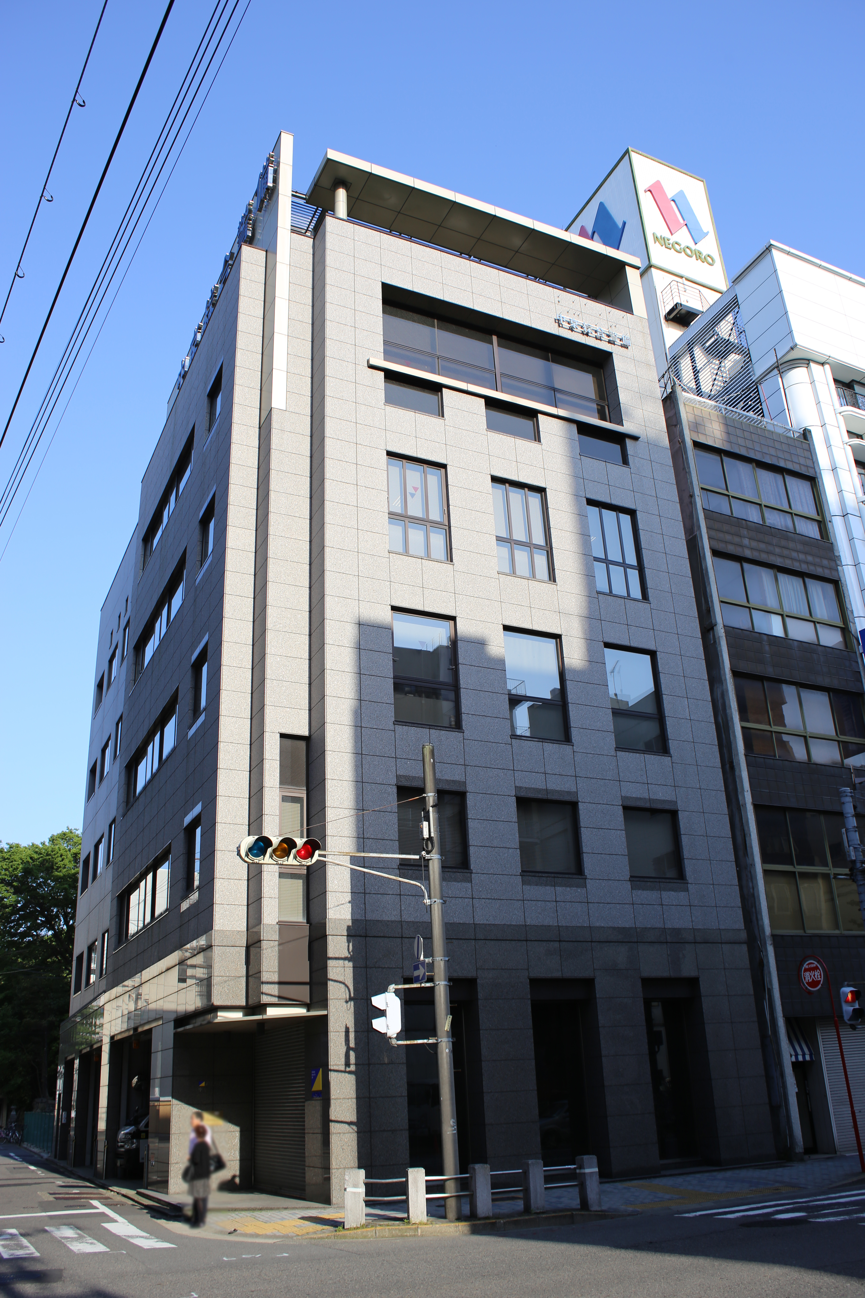 名古屋市中区栄三丁目の中京綜合警備保障本社を西側公道北側より撮影。ただし、人物につき画像処理済み。